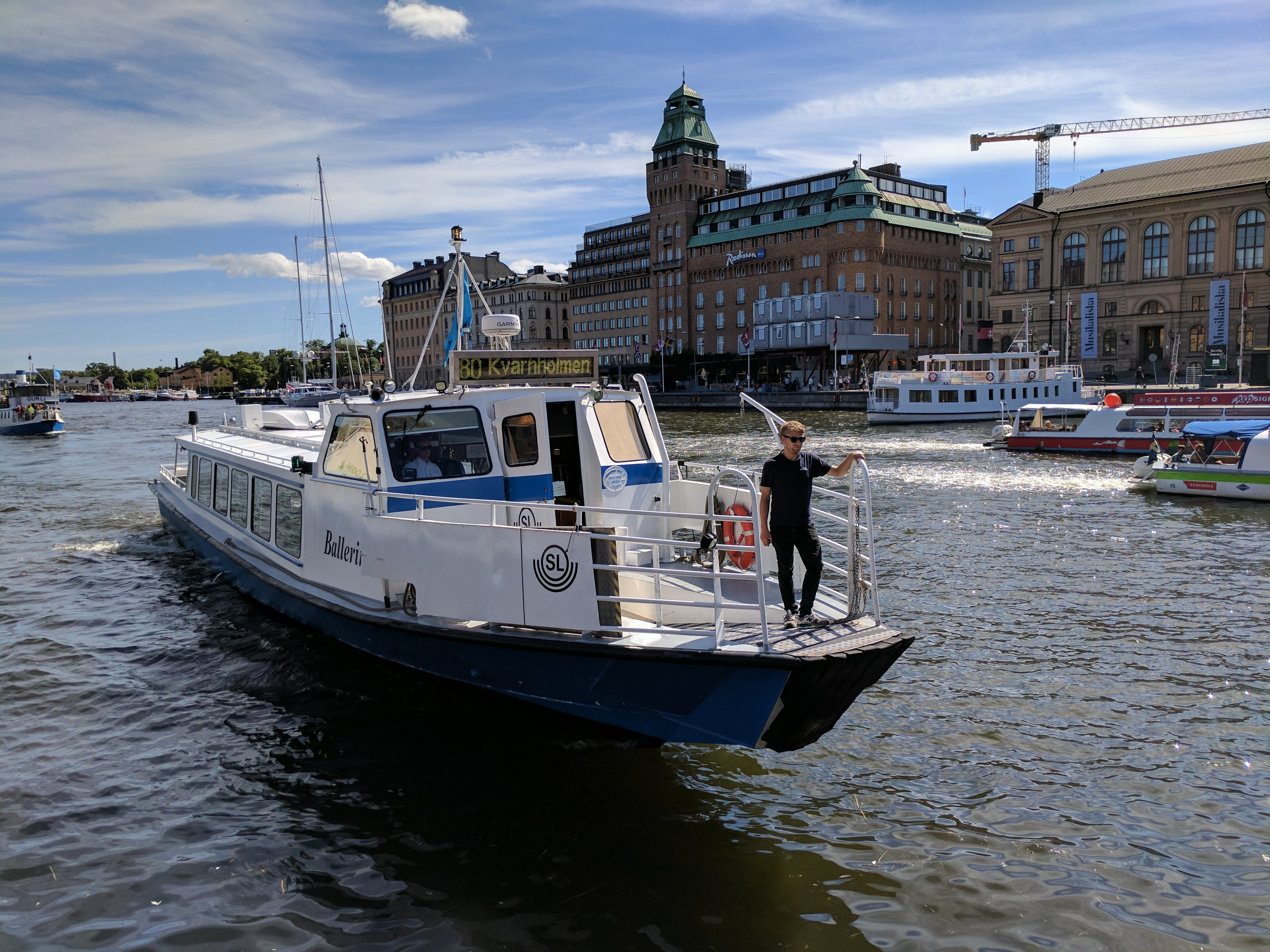 M/S Ballerina 20170723